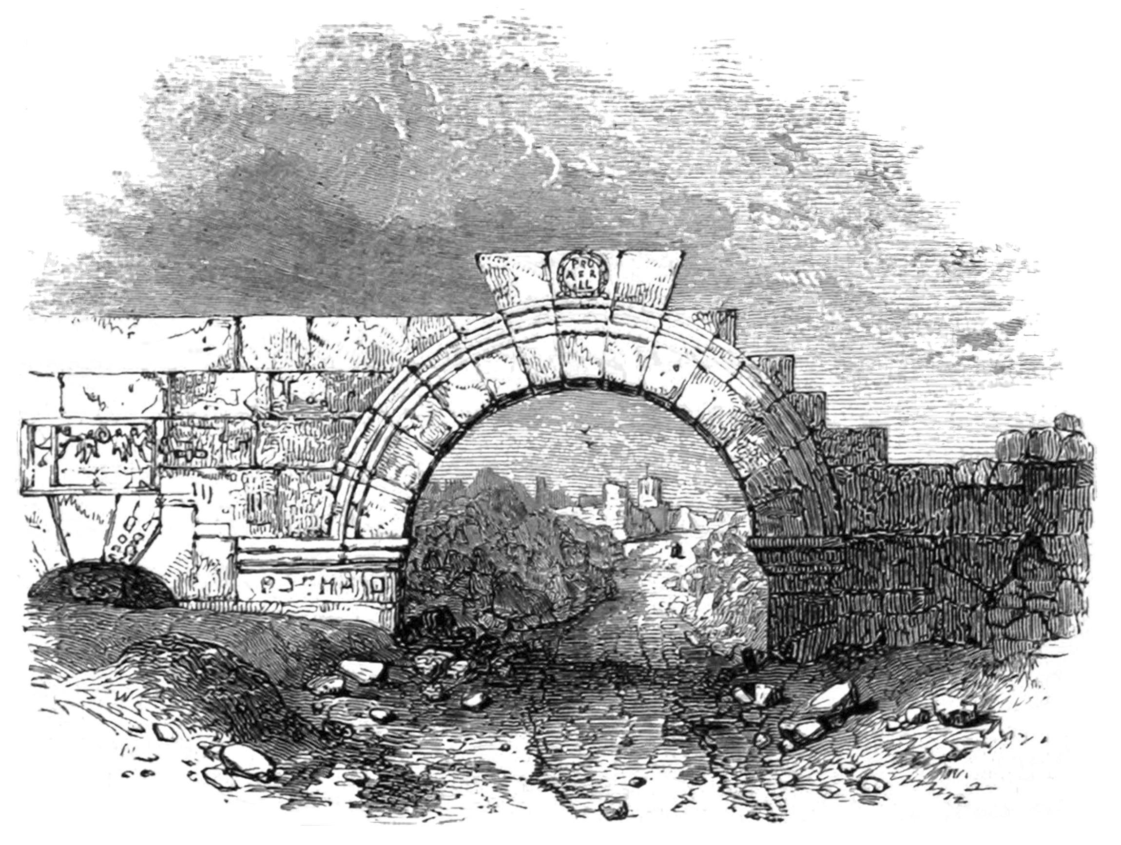 Kastell Gheriat el-Garbia: Die Porta praetoria im Jahr 1850. Bis zum Einsturz des Mitteltores in den frühen 1980er Jahren und dem anschließenden massiven Steinraub durch Einheimische war die Fassade – bis auf den rechten Abschnitt – so erhalten geblieben, wie sie Heinrich Barth 1850 gesehen hatte.